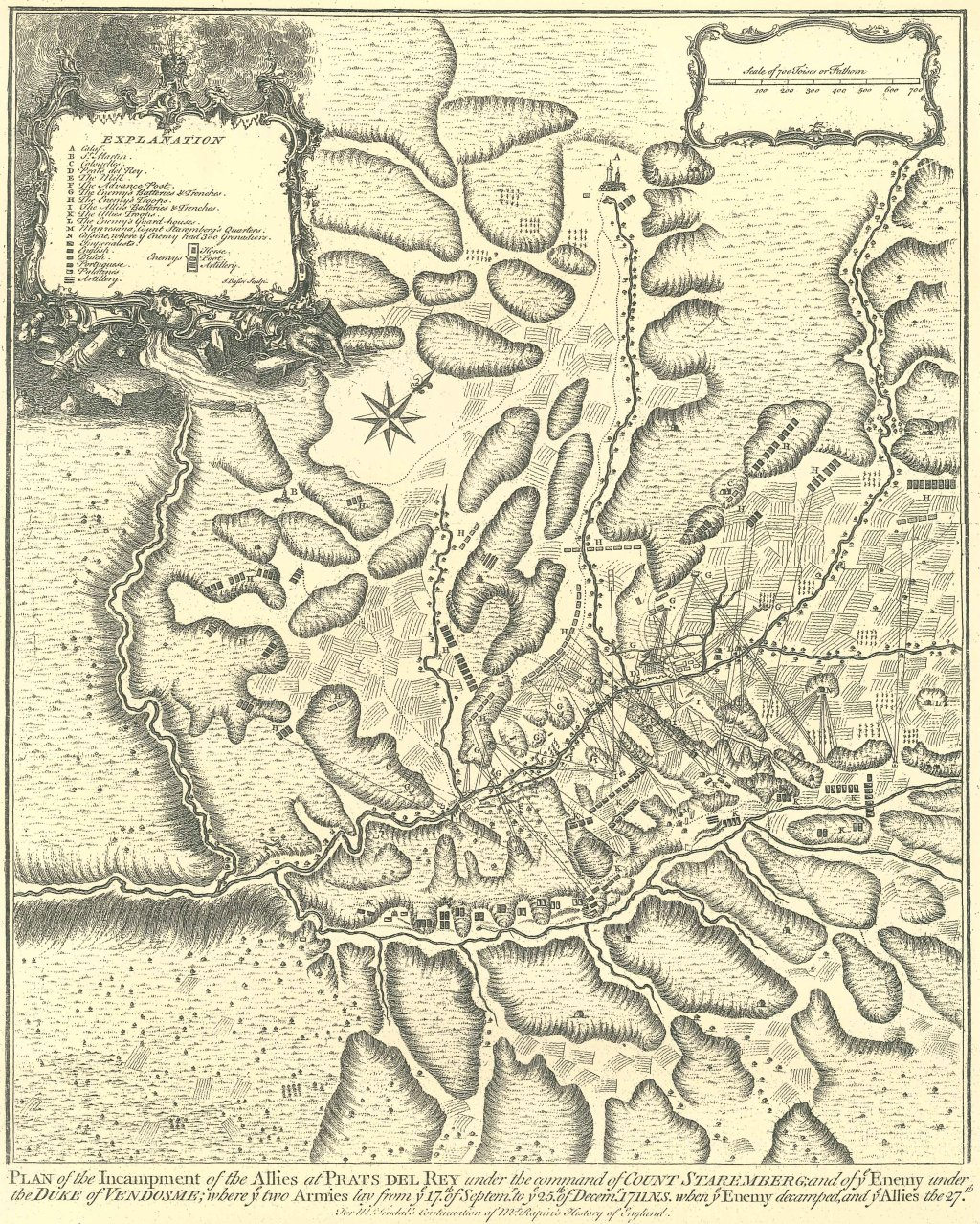 Mapa de la batalla de Prats de Rei, de 1711